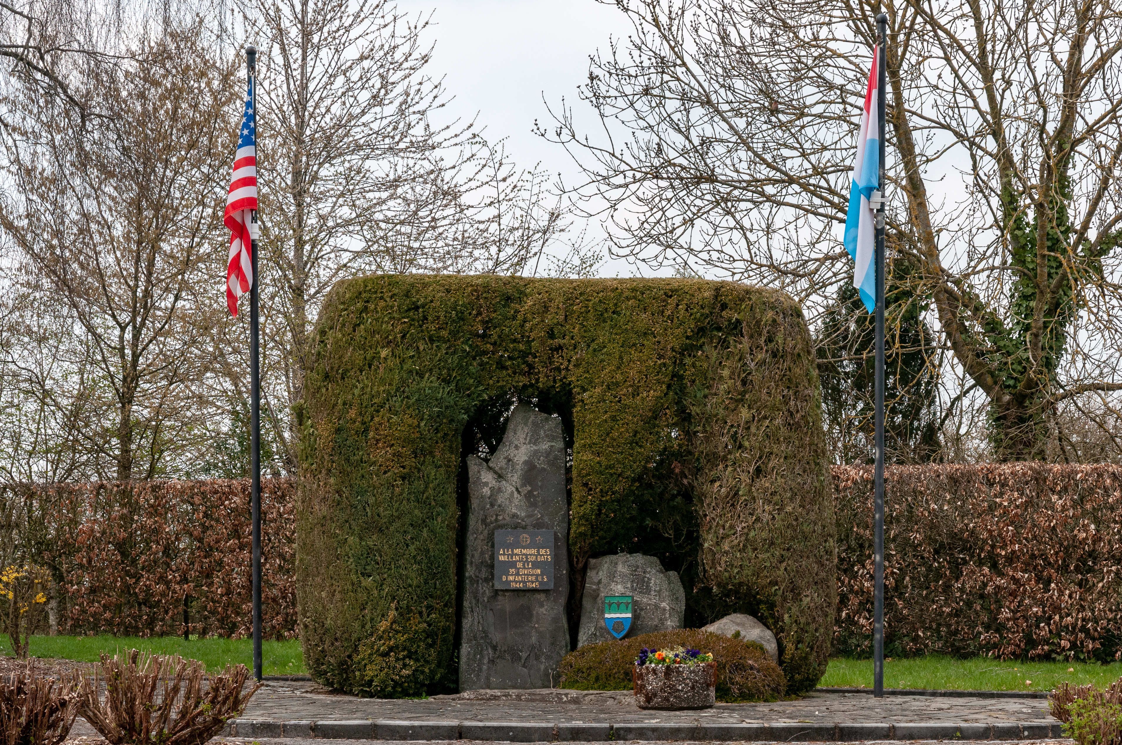 D'Krichsmonument op der Lëndchen zu Bauschelt.